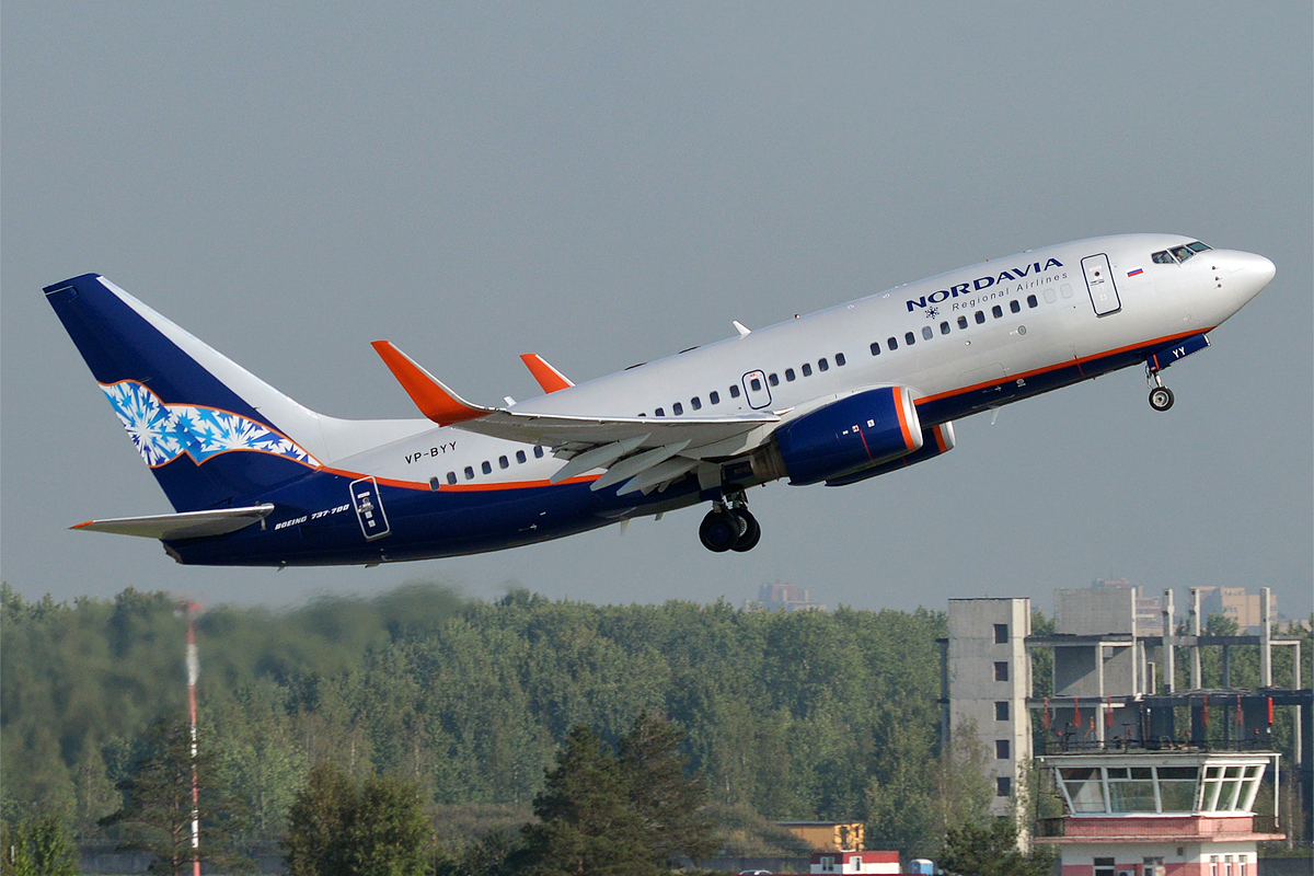 Nordavia, VP-BYY, Boeing 737-752